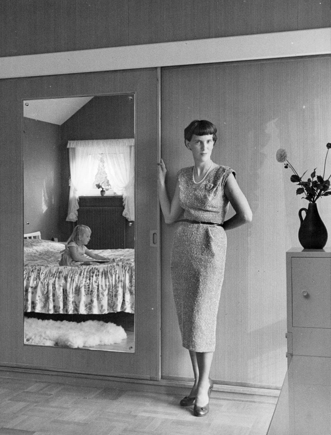 Fotografi föreställande Birgit Rausing med dotter. Av baksidesinformationen att döma är bilden publicerad i Veckojournalen 1954:36.